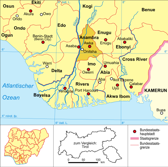 Politische Karte Nigerias (Bundesstaat Anambra hervorgehoben)